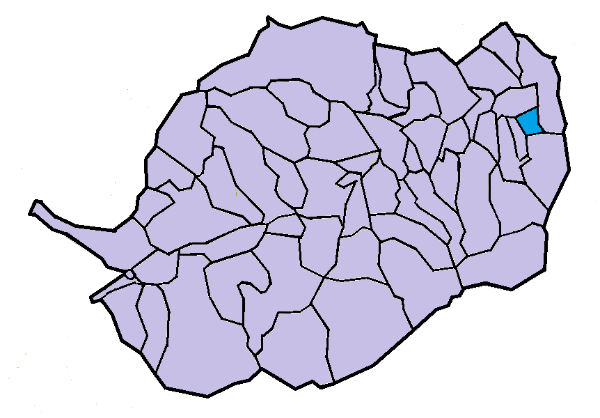 Rigardà en el Conflent, a partir del mapa municipal del Conflent de lliure disposició adaptat al Nomenclàtor toponímic aprovat el 2007